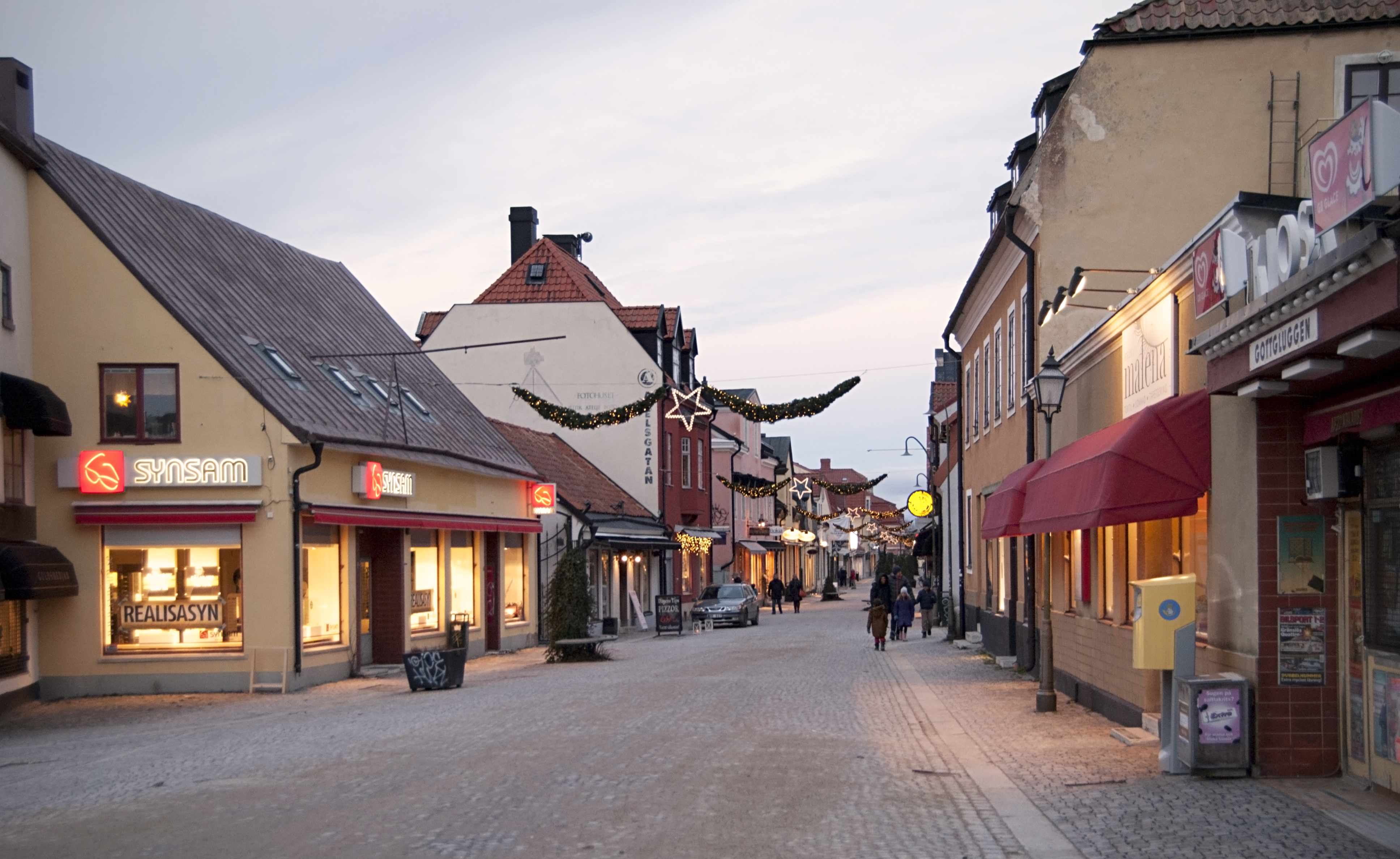 Vinter och skymning på Visbys huvudgata, Adelsgatan.